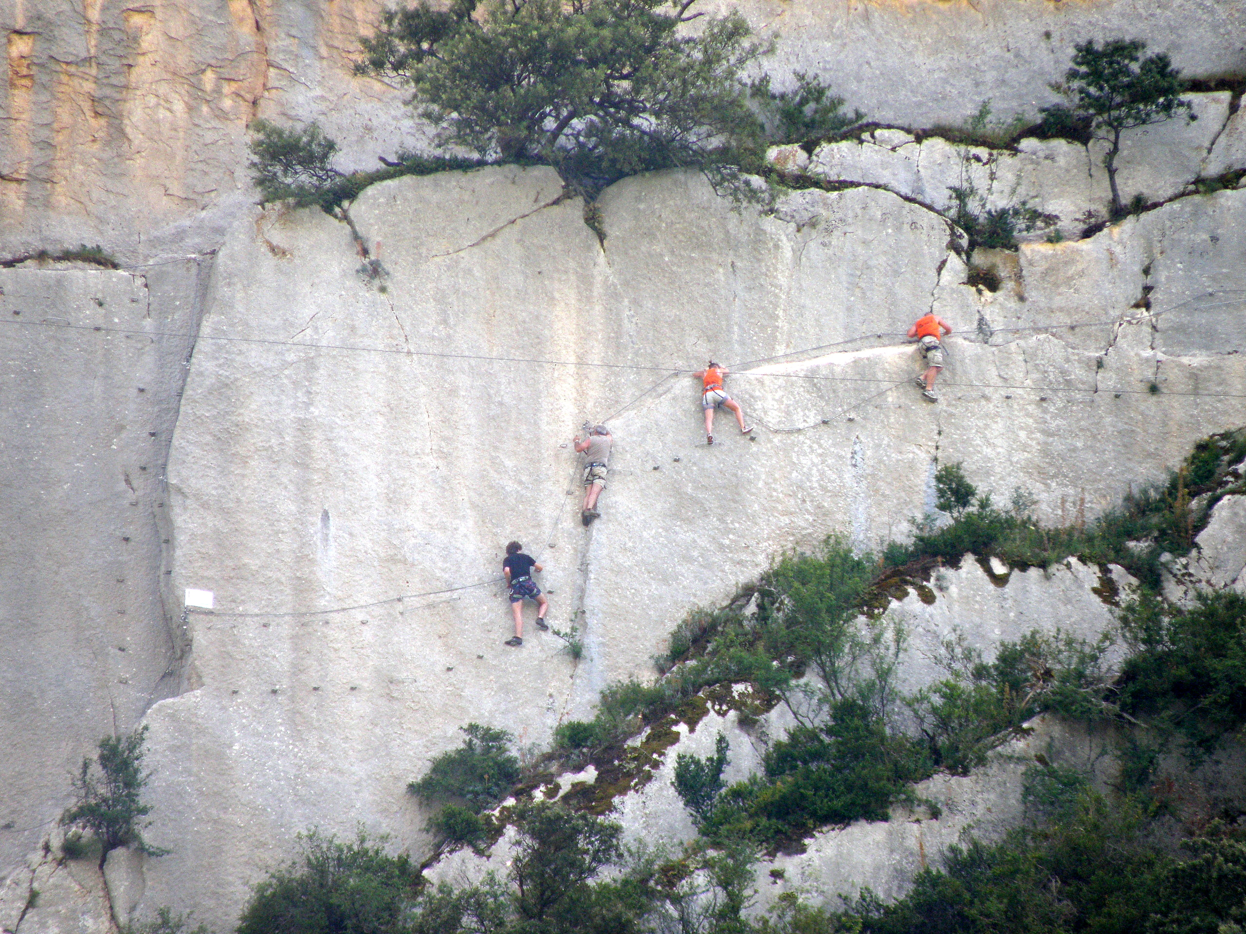 Buis-les-Baronnies (Drôme, France). Le rocher Saint-Julien, escalade sur la face nord par la via ferrata.